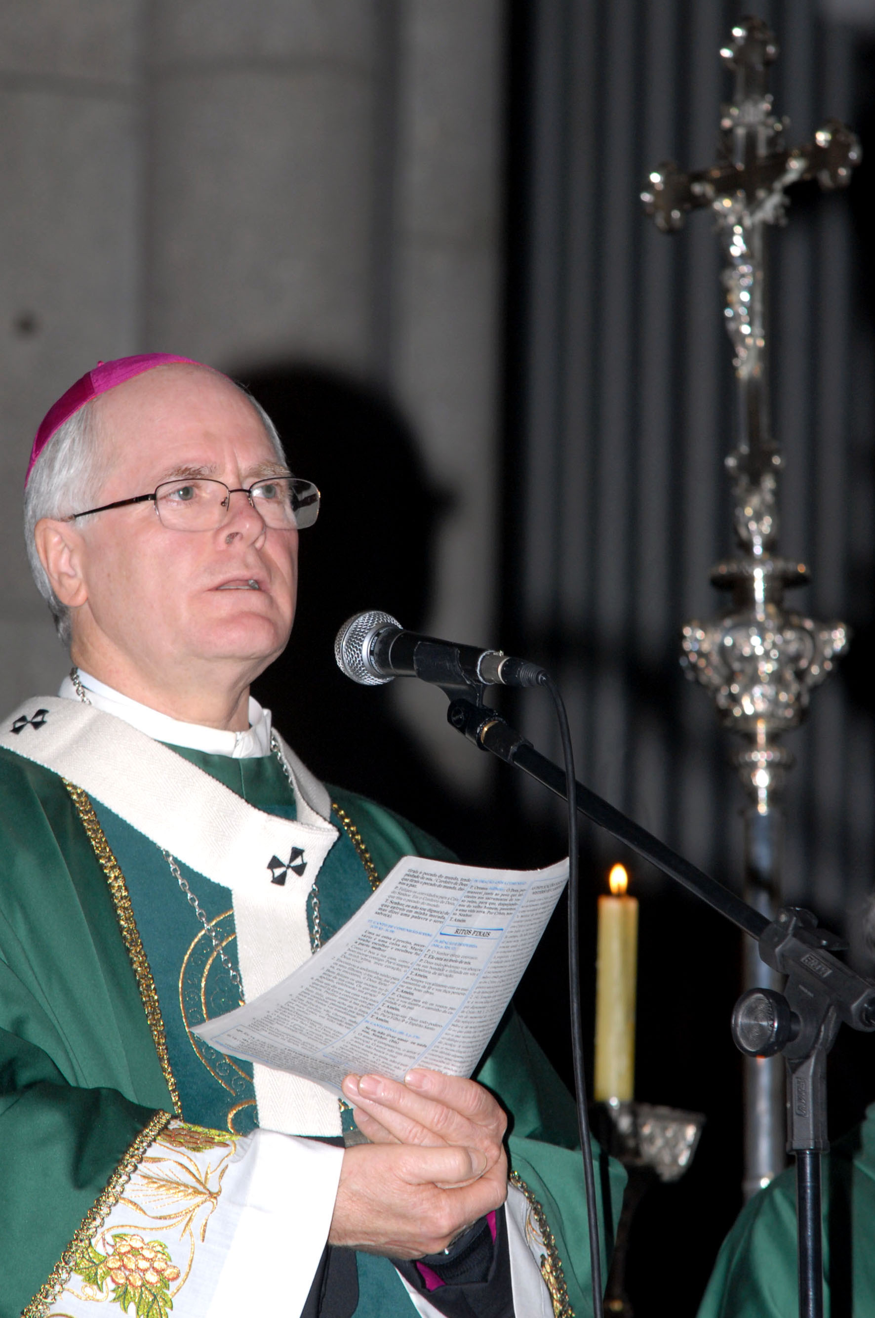 Dom Odilo Scherer, arcebispo de São Paulo.